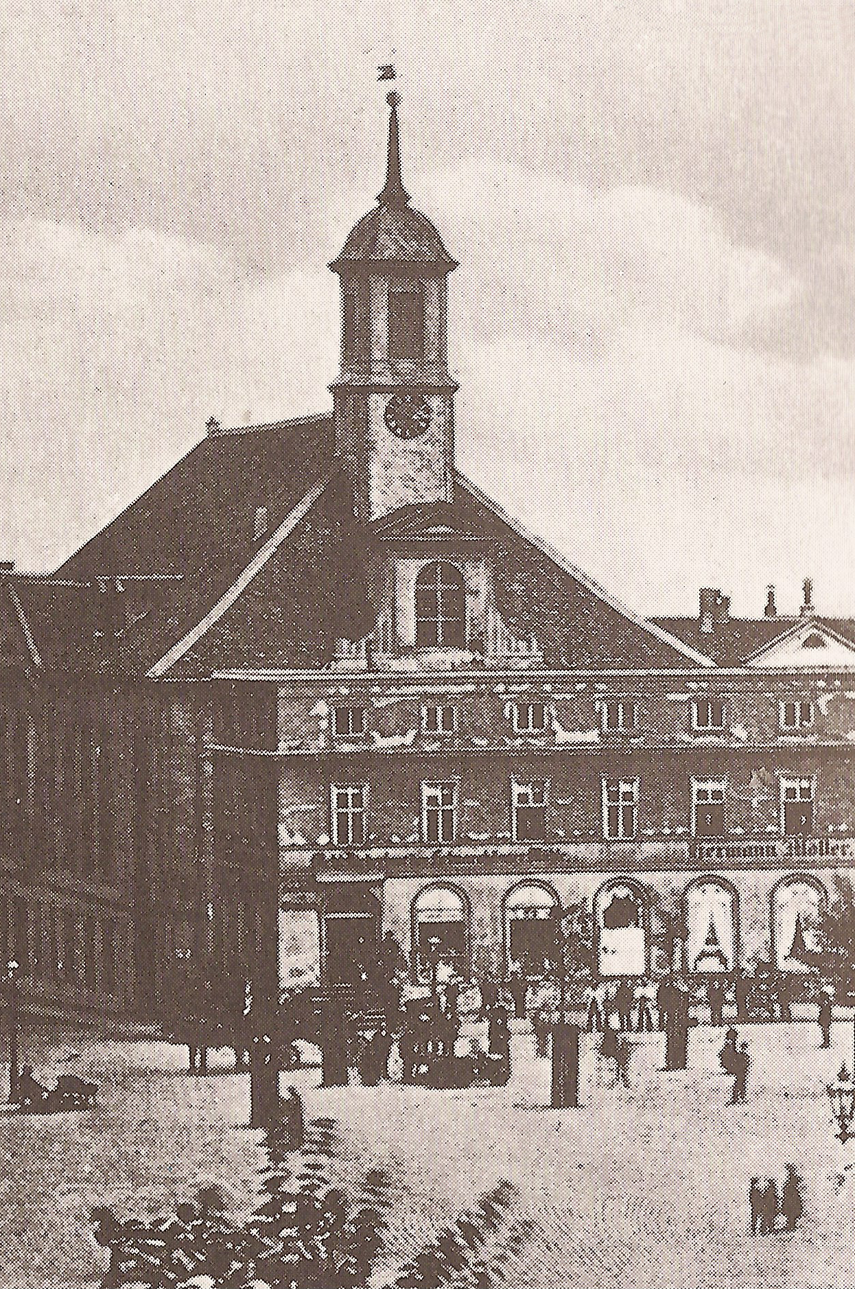 Garnisonkirche Kassel (Germany) 1886 vom Königsplatz aus. Im Vordergrund die Teile der „Hallen“ die 1887 niedergelegt wurden. Reproduktion einer alten Photographie